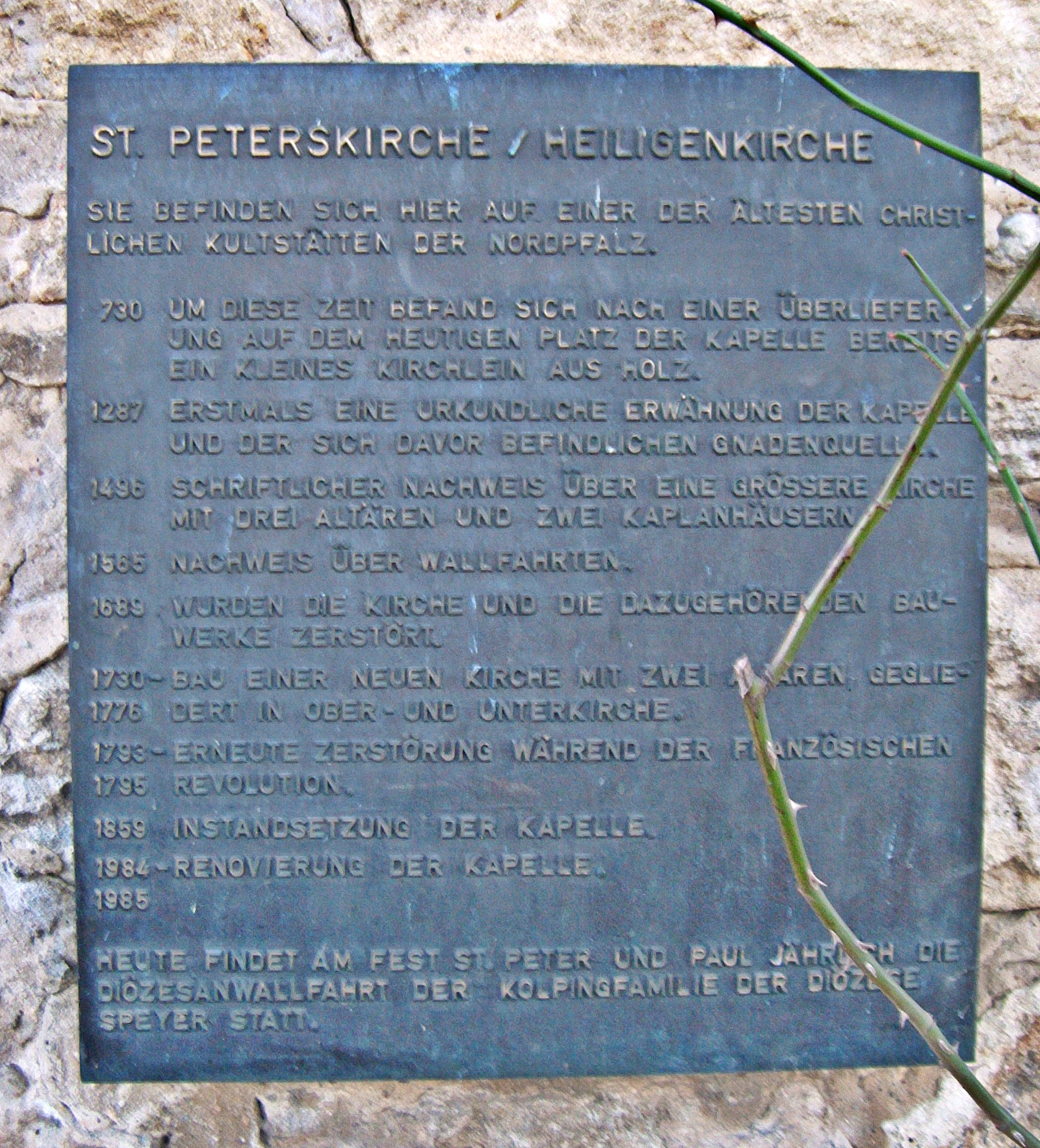 Bockenheim an der Weinstraße, Heiligenkirche (St. Peter), Tafel zur Geschichte